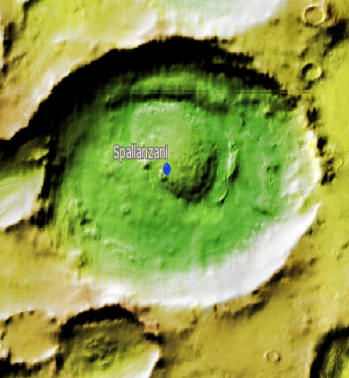 Cráter marciano Spallanzani. (Imagen IAU/USGS/Goddard/A SU/USGS)